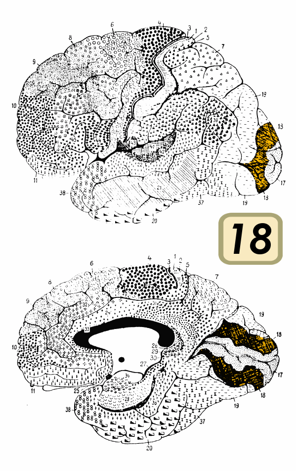 Brodmann area 18.